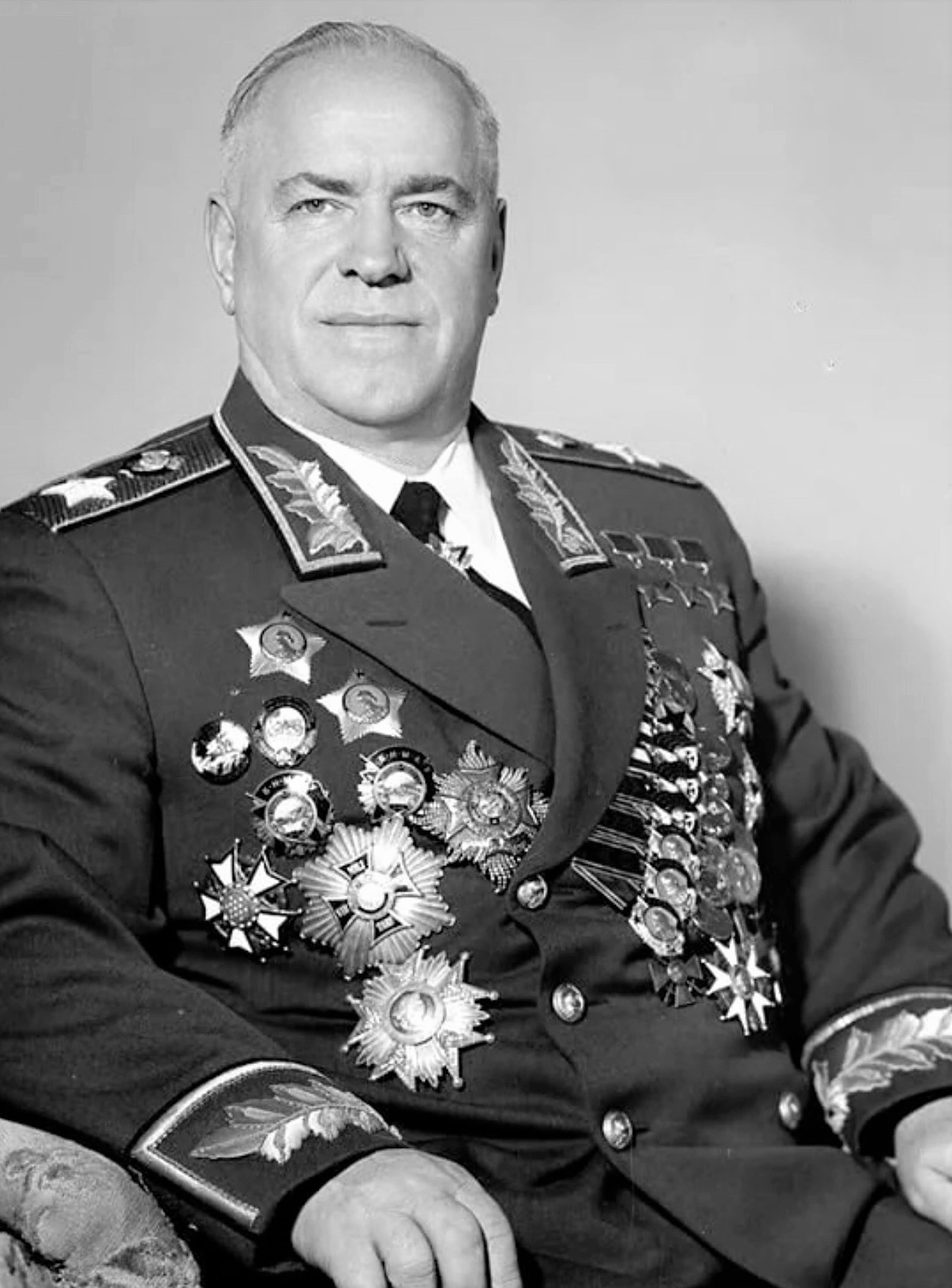 четырежды Герой Советского Союза кавалер двух орденов "Победа" Георгий Константинович Жуков в период хрущёвской опалы